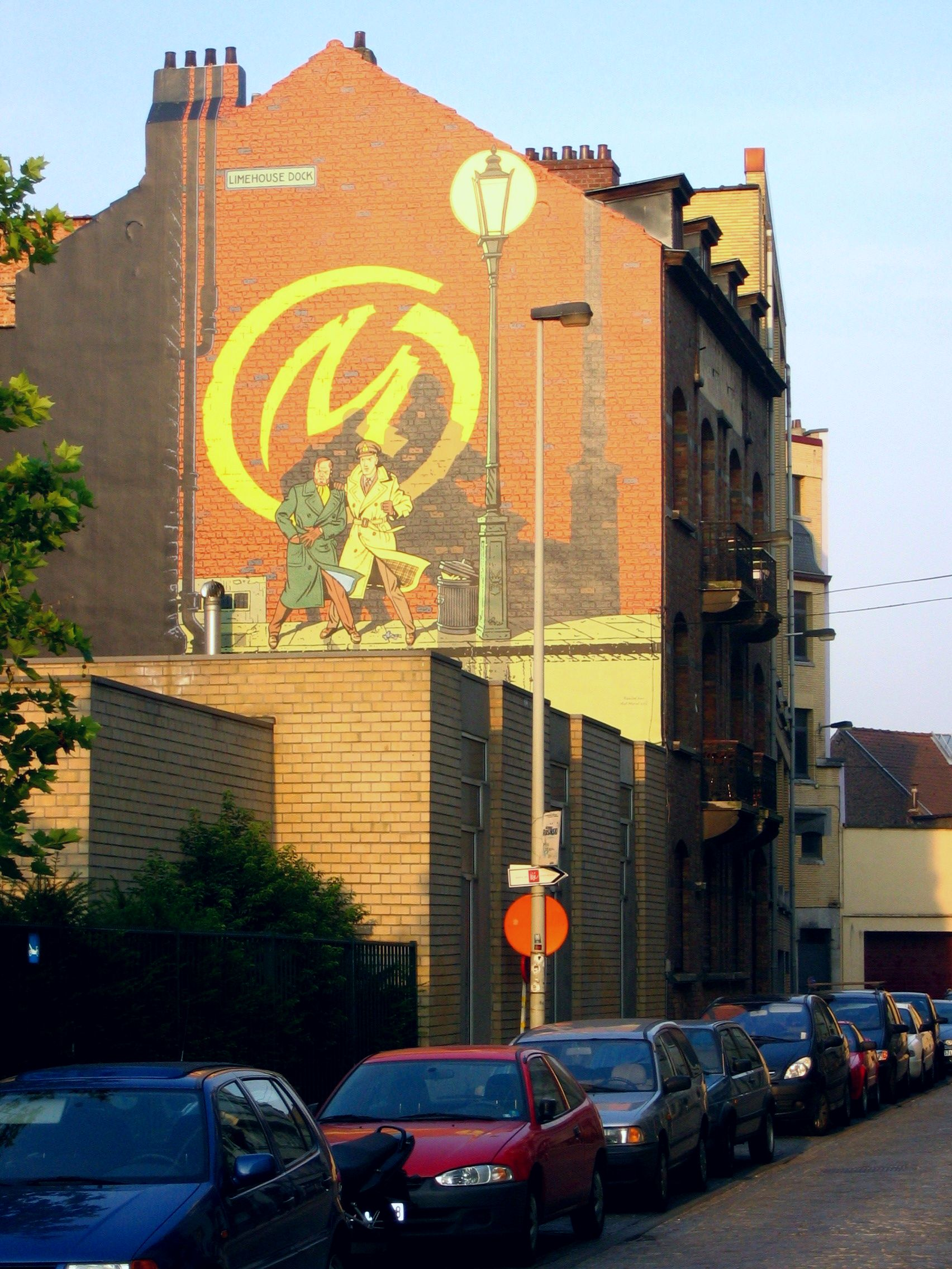 Personnages de la bande dessinée Blake et Mortimer, de Edgard P. Jacobs: fresque murale située rue du Houblon à Bruxelles.